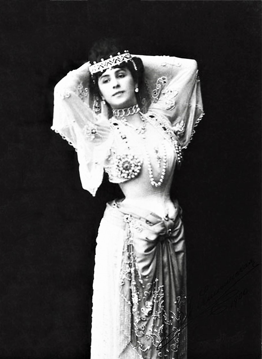 Матильда Кшесинская в роли Никии в балете «Баядерка». Постановка Мариуса Петипа